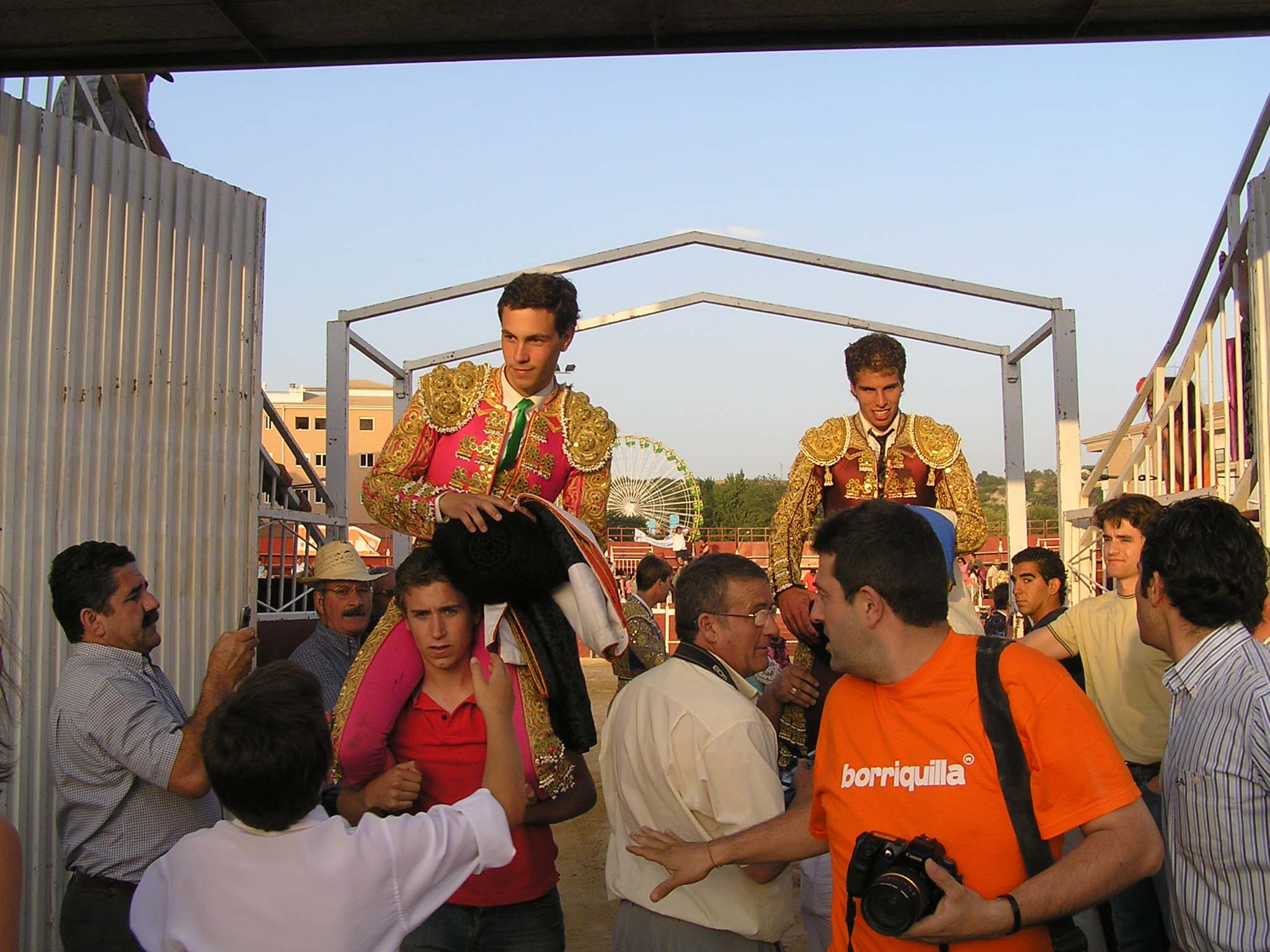 Salida en hombros de la plaza de toros de Alcalá la Real (Jaén, España)